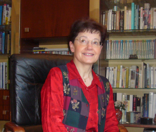 Photo d'une scientifique, prise en 2010, à Meudon